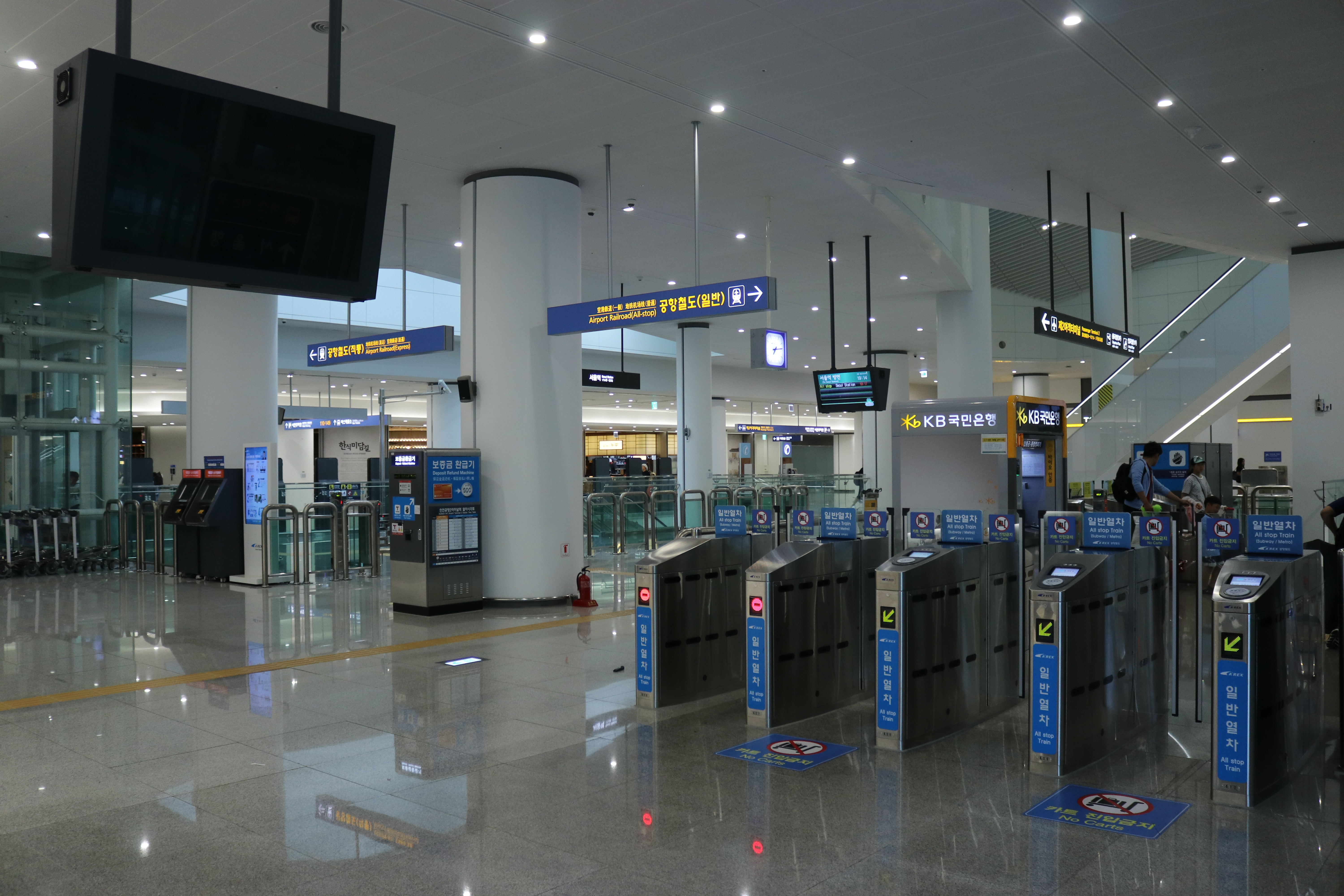 인천공항 2터미널역 개찰구